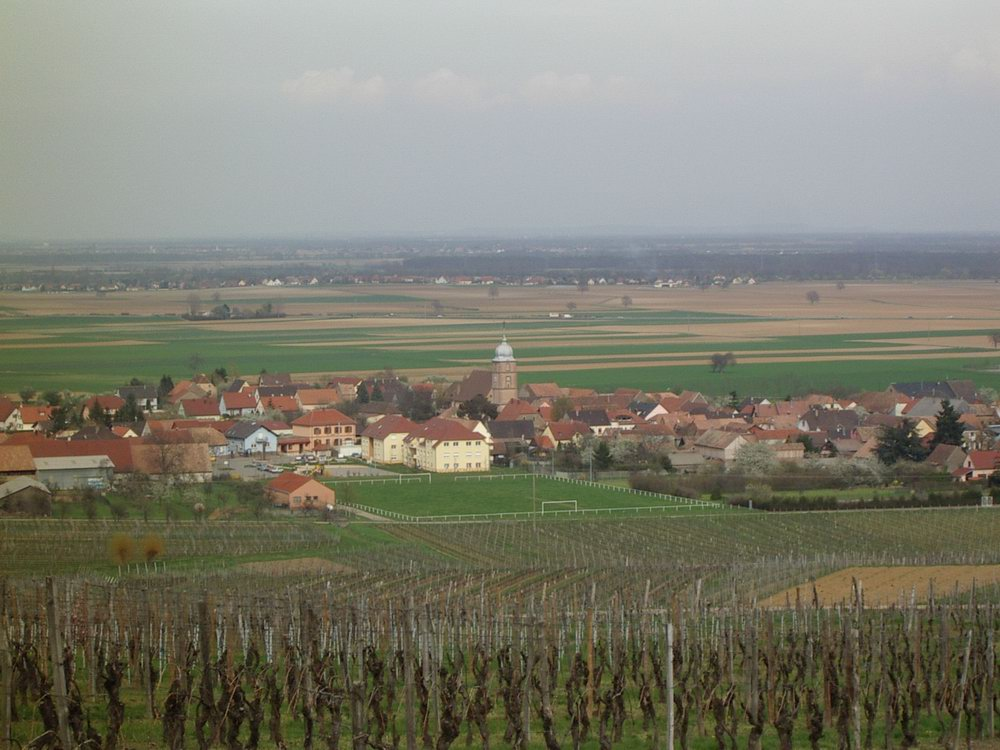 Bergholtz, Haut-Rhin (France) Author: Rémi Stosskopf Date: 19 april 2006